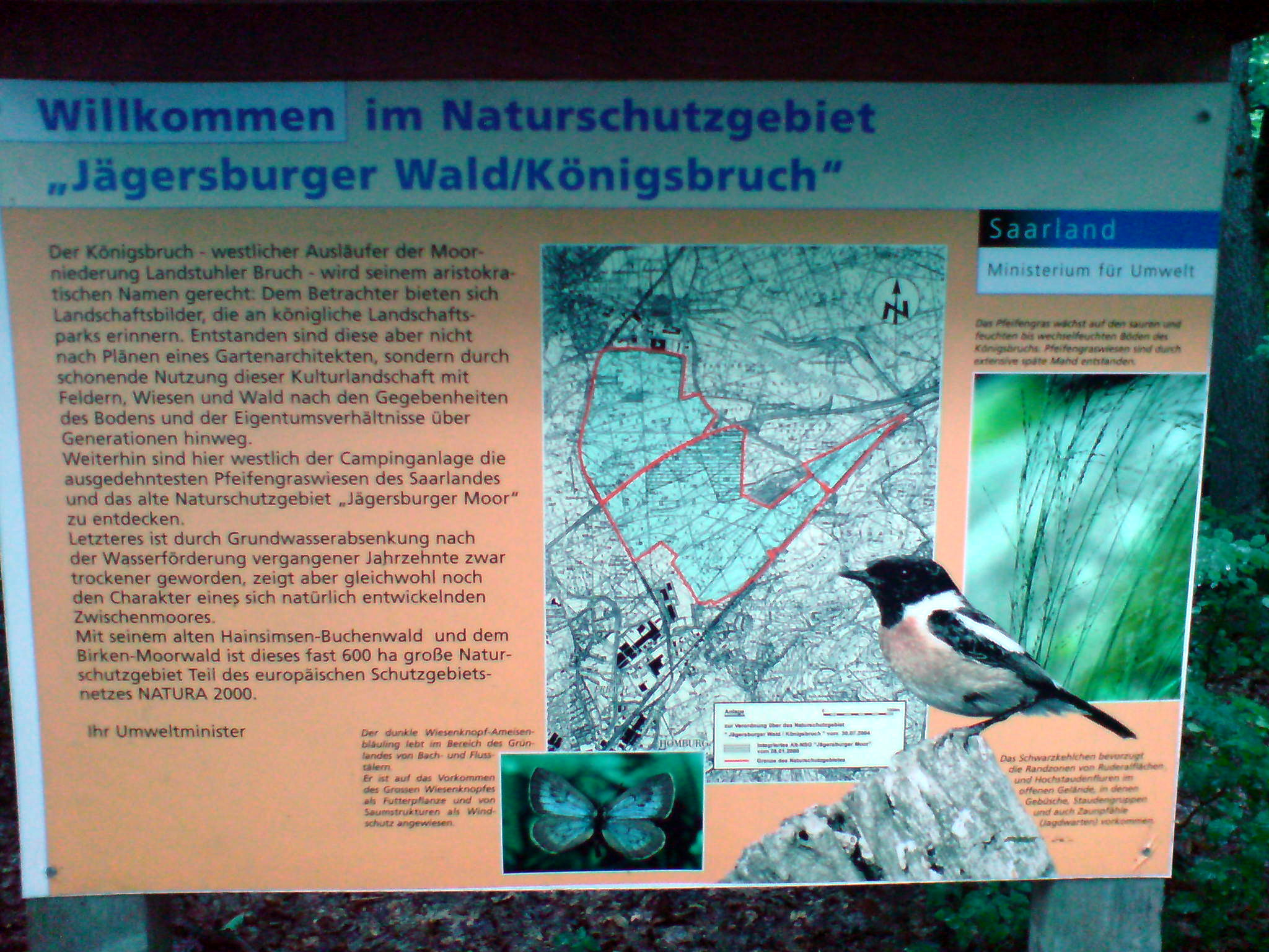 Aushangtafel im Königsbruch; Naturschutzgebiet „Jägersburger Wald/Königsbruch“ in Homburg